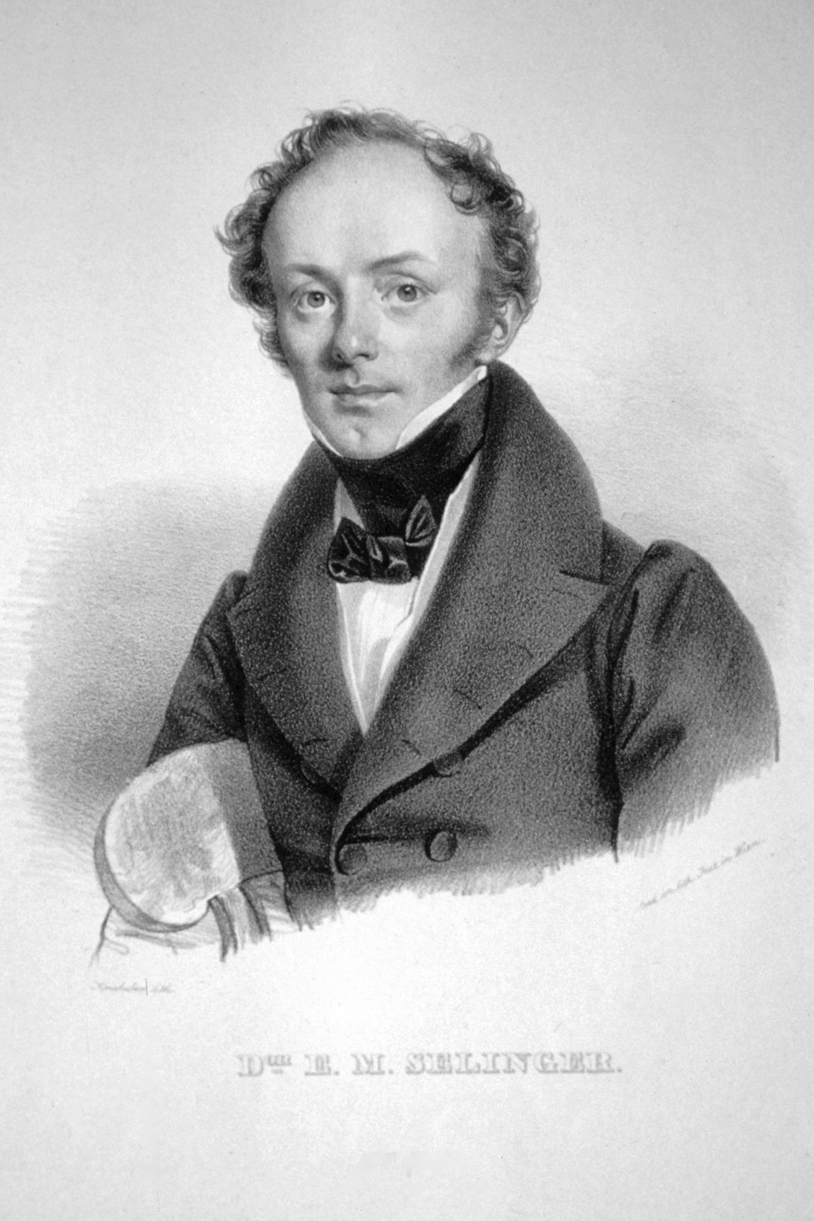 Engelbert Maximilian von Selinger (1802-1862), Dr. juris, Beamter, Schriftsteller, Reichsratabgeordneter. Lithographie von Josef Kriehuber, um 1840